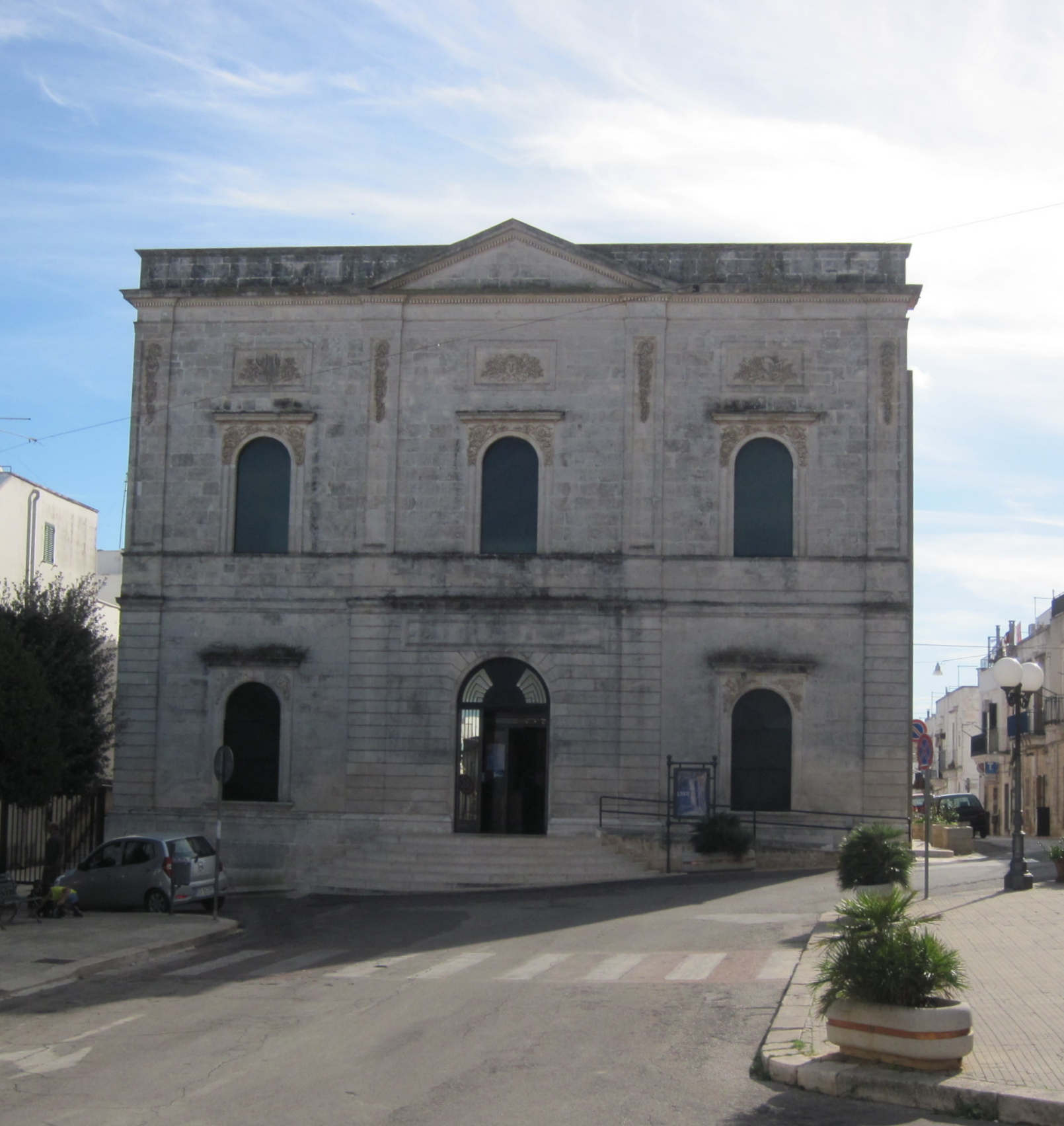 Teatro Comunale di Ceglie Messapica. Struttura realizzata su progetto dell'ingegnere Antonio Guariglia di Lecce. Edificata a partire dal 1873. Nel dettaglio della foto la facciata in stile neoclassico.